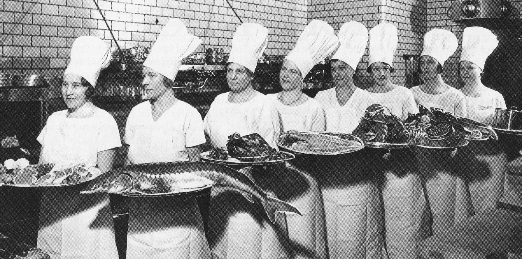 Sturehofs kallskänkor med havets läckerheter